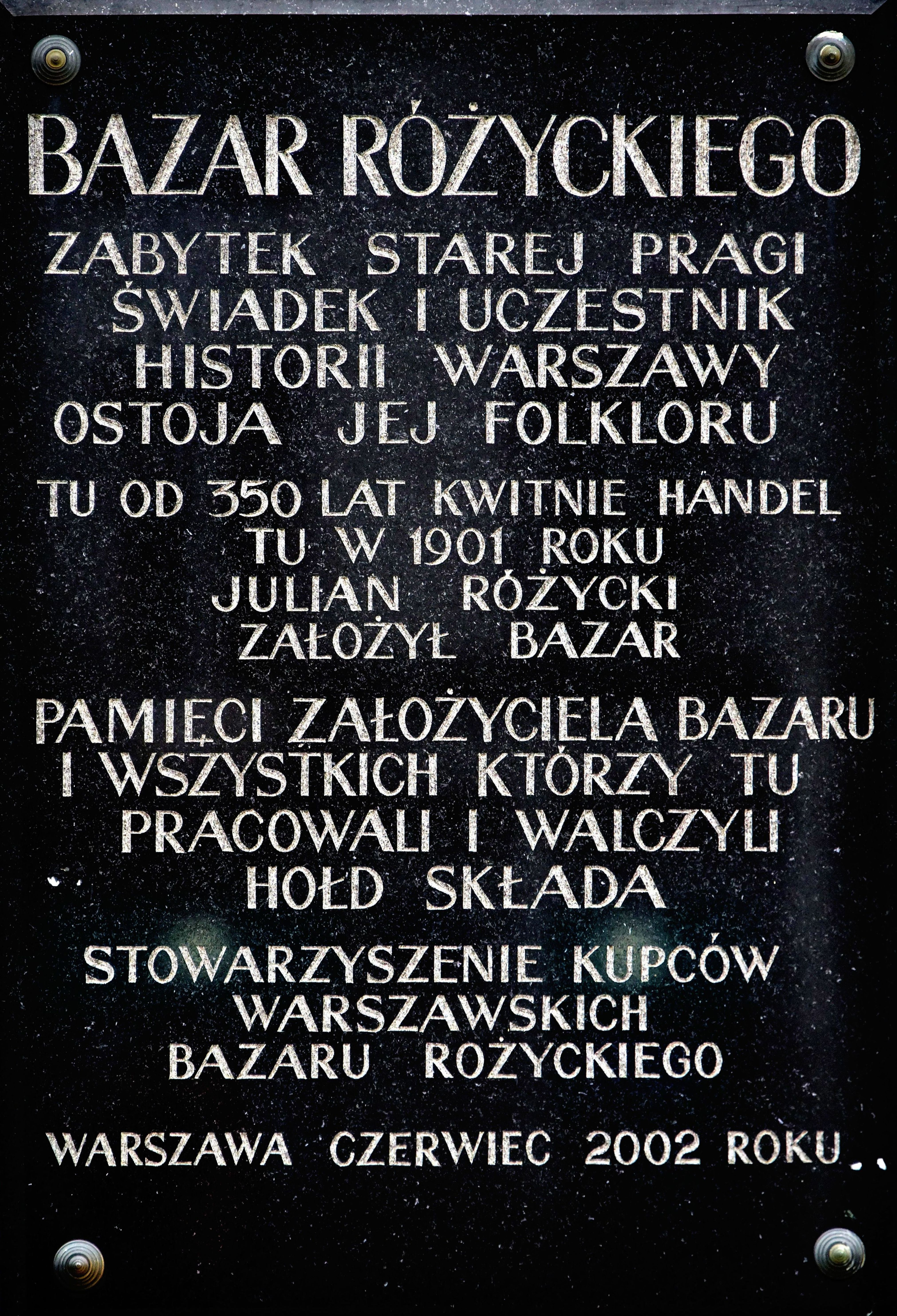 Tablica przy wejściu na bazar Różyckiego (od strony ul. Targowej)